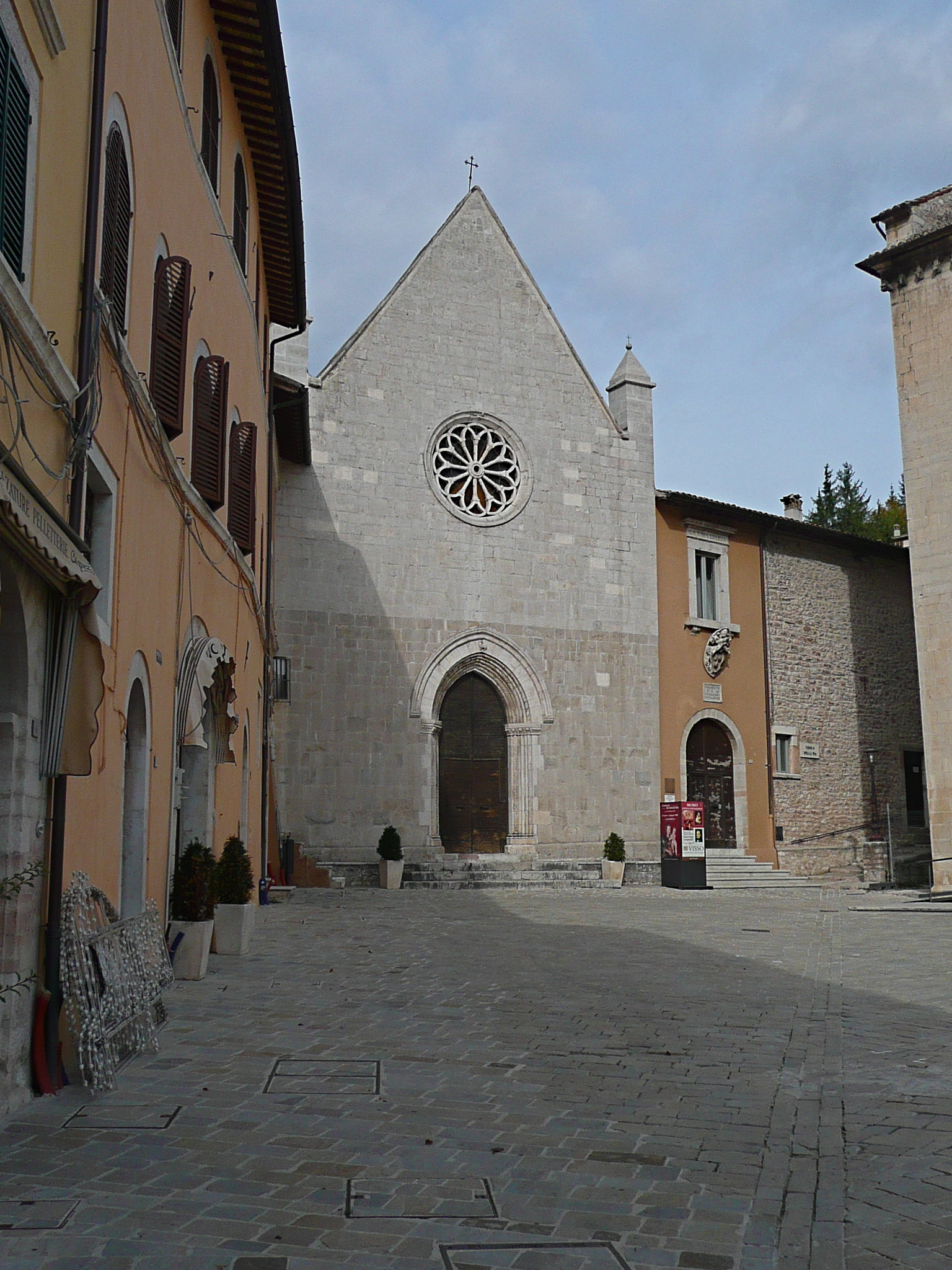 Visso, chiesa di Sant'Agostino